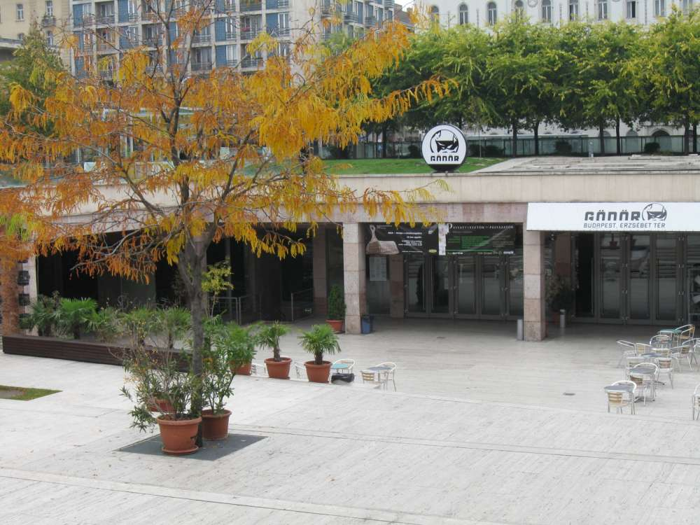 Gödör Klub (Budapest, V. ker., Erzsébet tér)